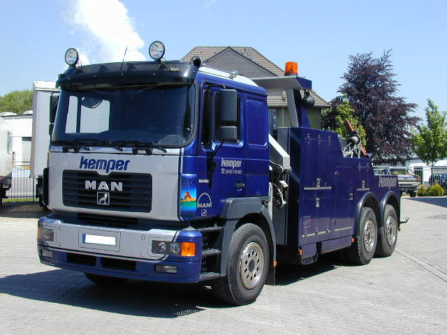 MAN 26.403 Abschleppwagen mit Masterlift Hubarm und Palfinger Ladekran